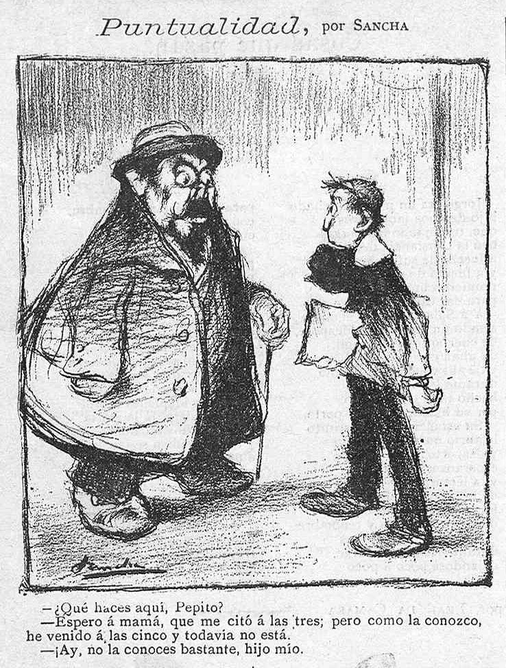 Puntualidad.